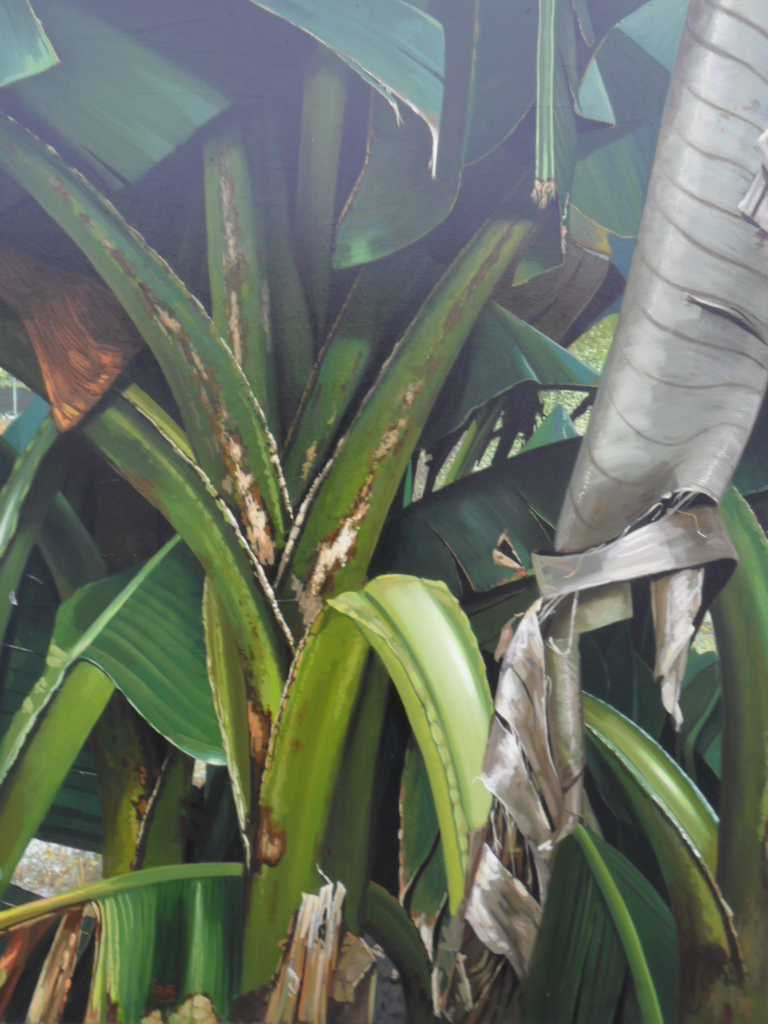 Aussi étonnant que cela puisse paraître ces bananiers ont été peints à Paris, d'après nature,sur un massif se trouvant à Pont Marie. Ce sont ces découvertes, au hasard de promenades, qui ont inspiré une série de tableaux ayant pour thème la végétation à Paris.